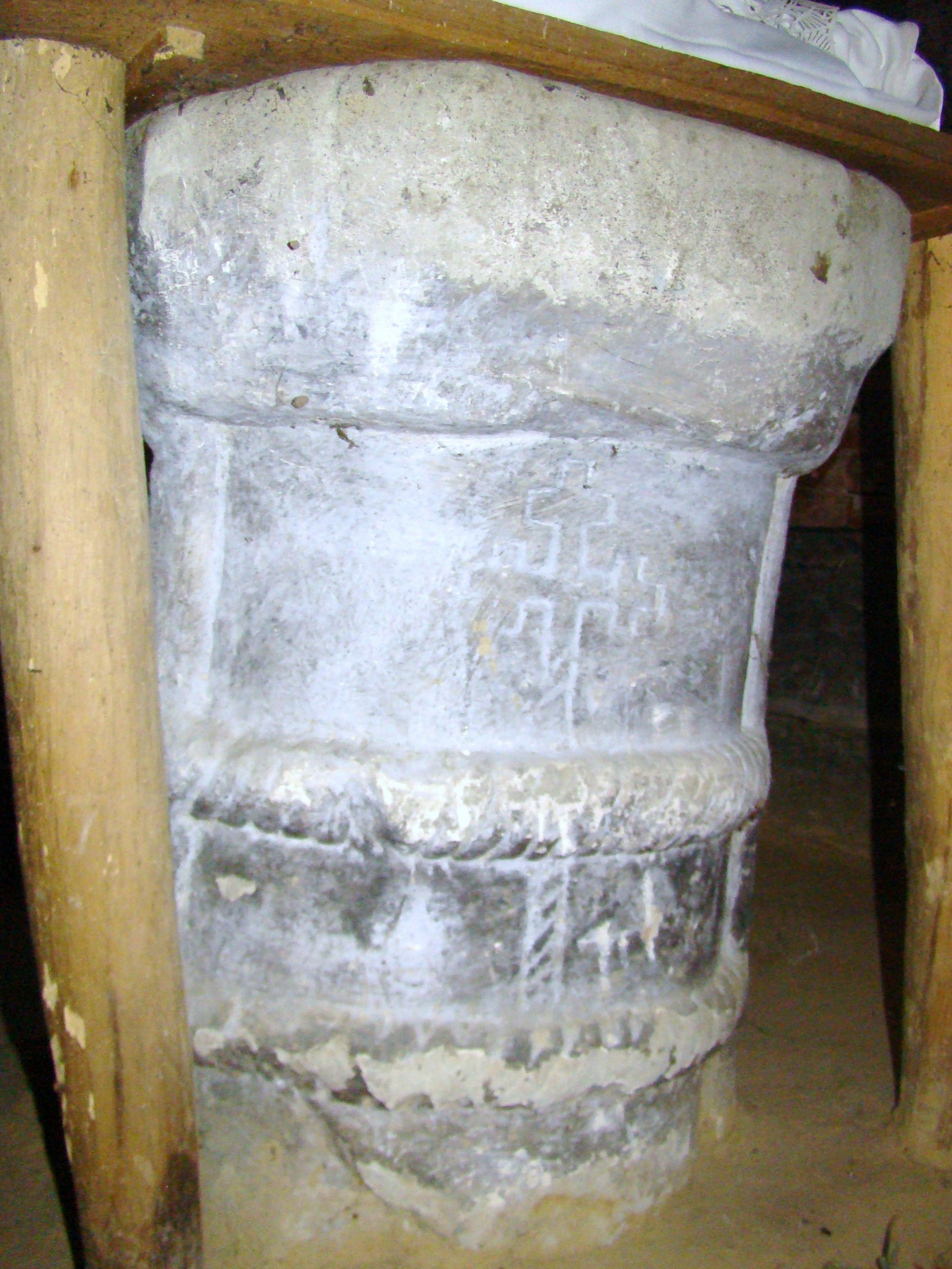 Biserica de lemn "Cuvioasa Paraschiva" , sat STEJERA; comuna MIREŞU MARE